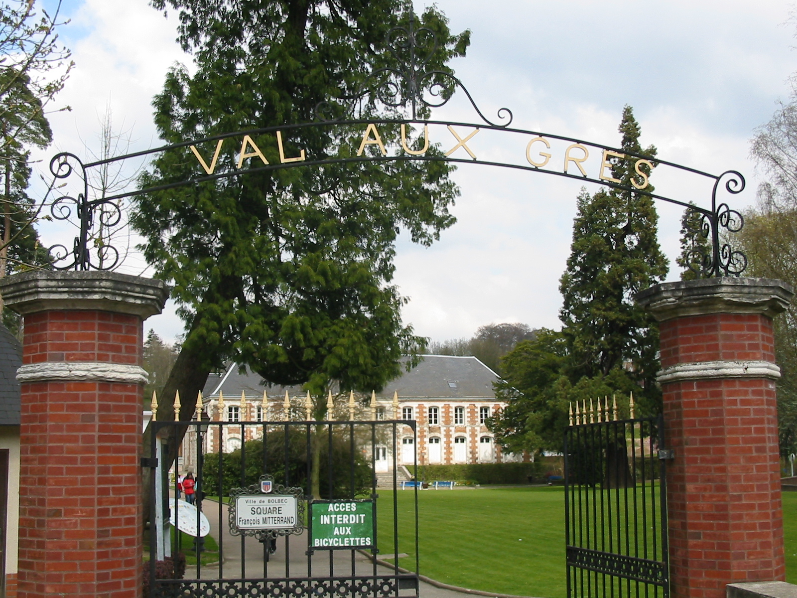 Entrée du parc du Val aux Grès à Bolbec, vue sur le château (antenne du Conservatoire à Rayonnement Départemental Caux vallée de Seine)